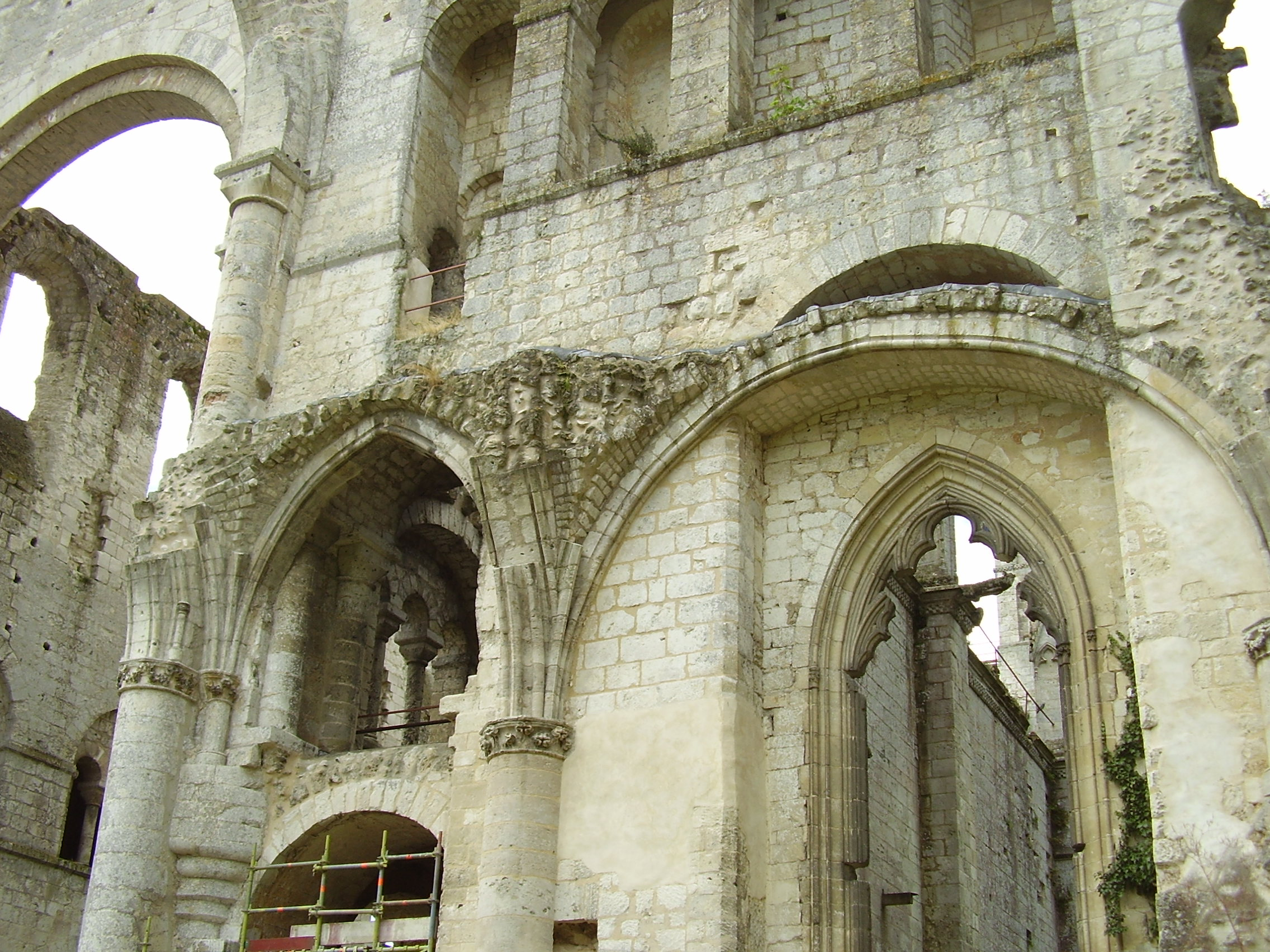 Abbaye de Jumièges, the most beautiful ruins in France